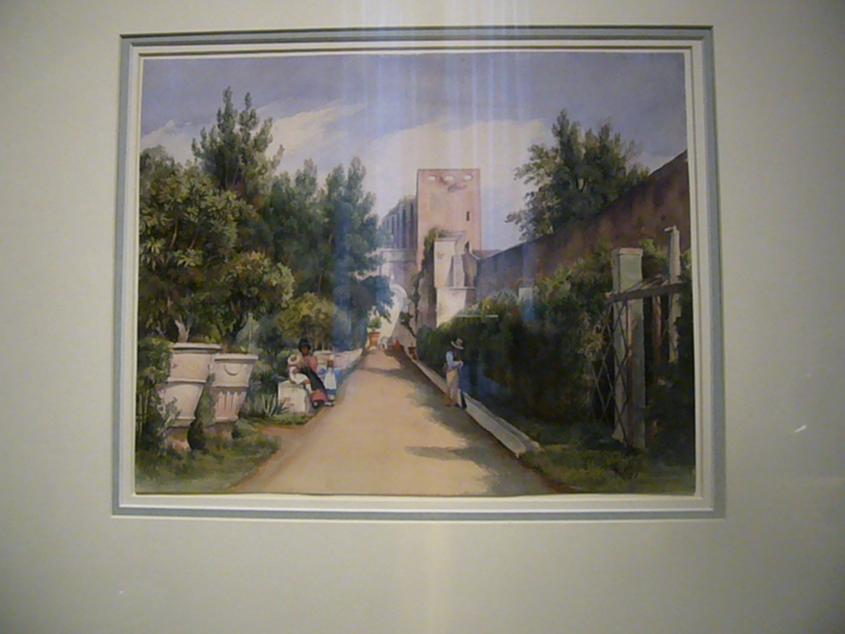 Viale dell'Aranciera a Villa Paolina